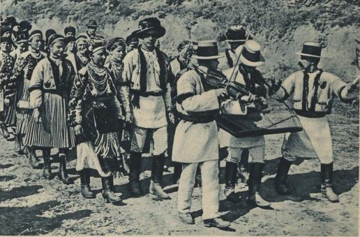 Хід на Свято Винограду на Поділлі.: Хід на Свято Винограду на Поділлі.Подільські музики.